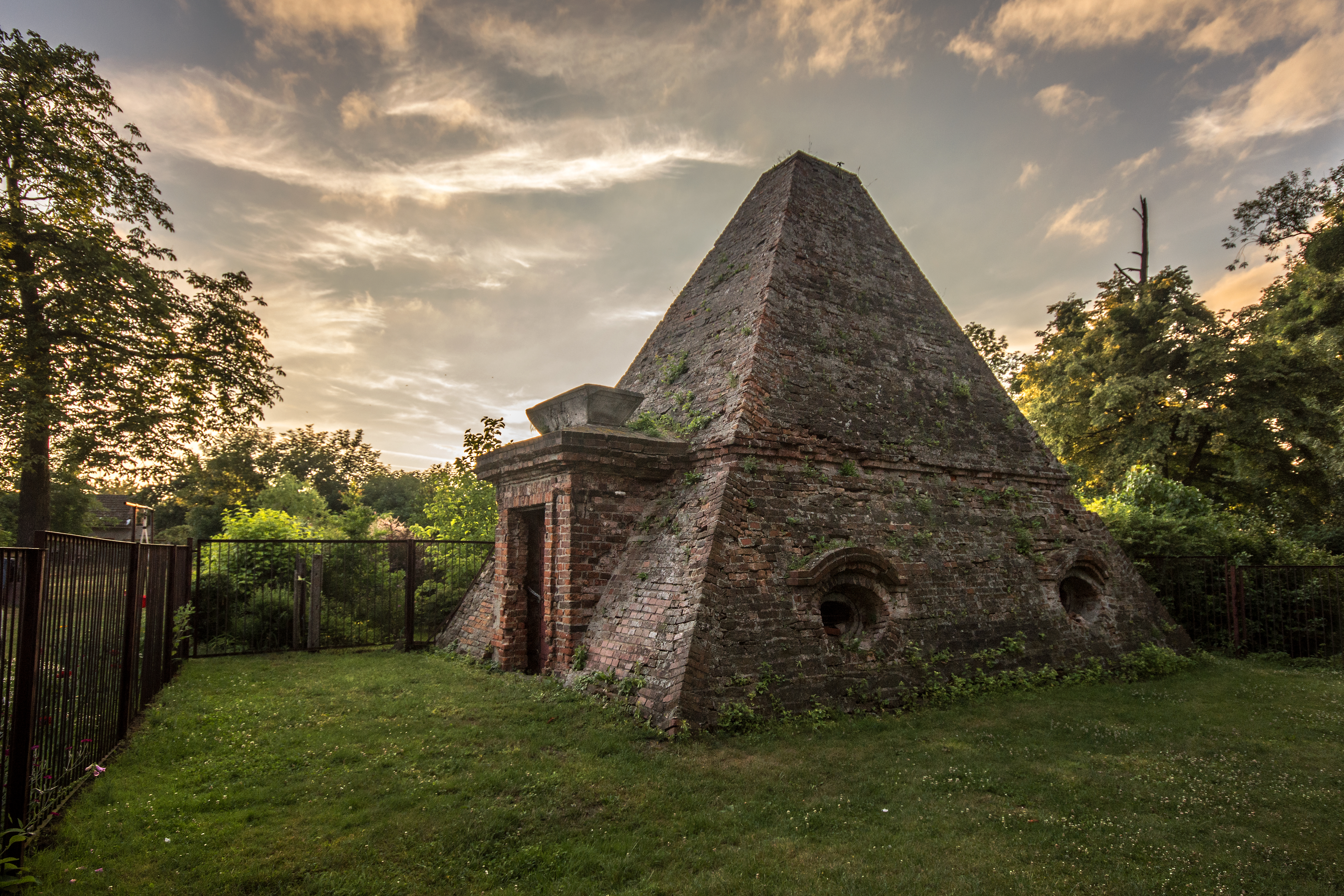 Rożnów, grobowiec rodzin Eben i Mohring ("piramida"), 1780